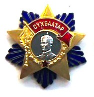 蘇赫巴托勳章